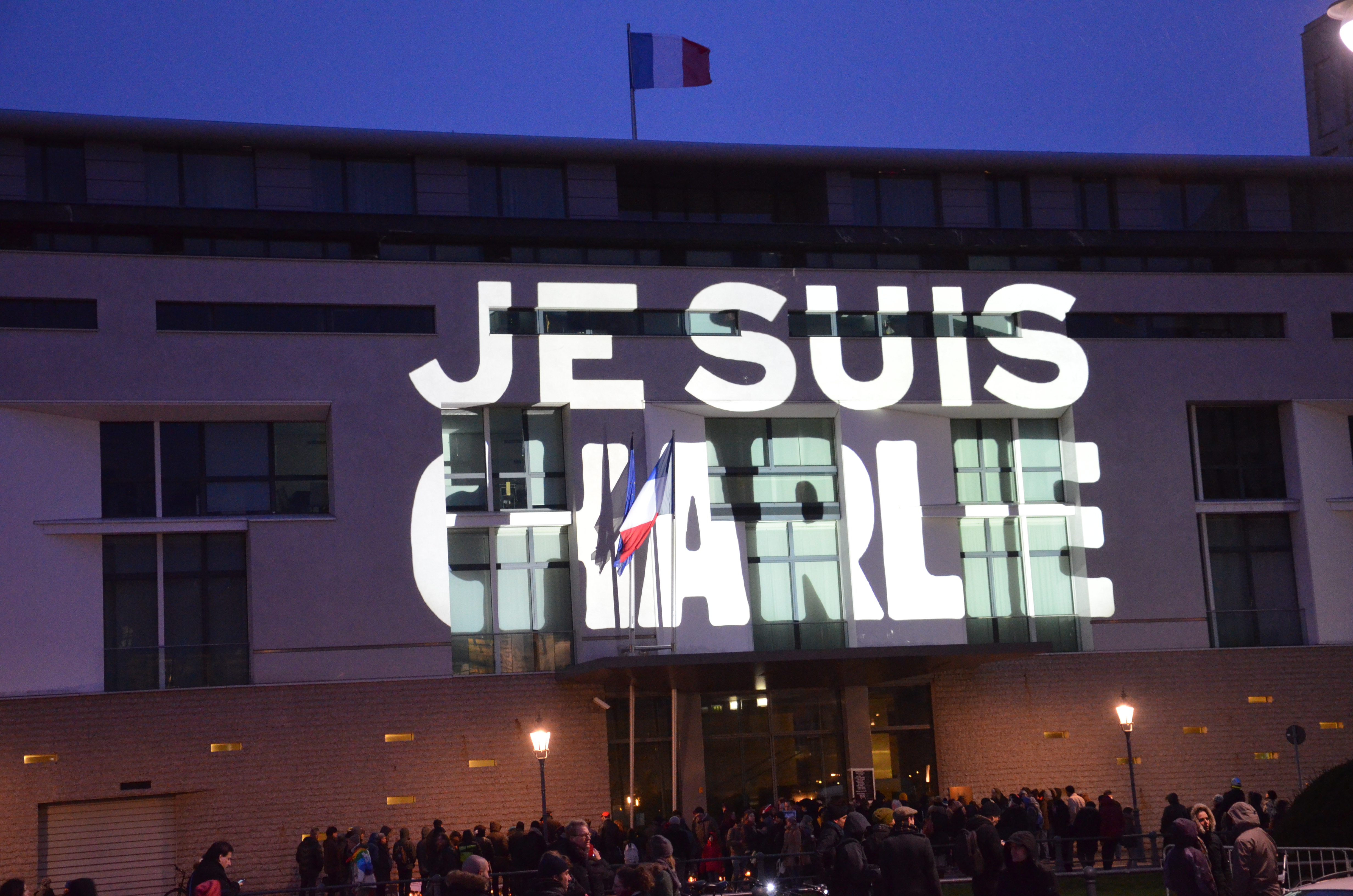 Nachdem sich am 11. Januar 2015 etwa 18.000 Menschen am Pariser Platz in Berlin zur Mahnwache für Charlie Hebdo eingefunden hatten, wurde am späten Nachmittag des selben Tages die Fassade der dortigen Französischen Botschaft mit dem Schriftzug Je suis Charlie angestrahlt ...